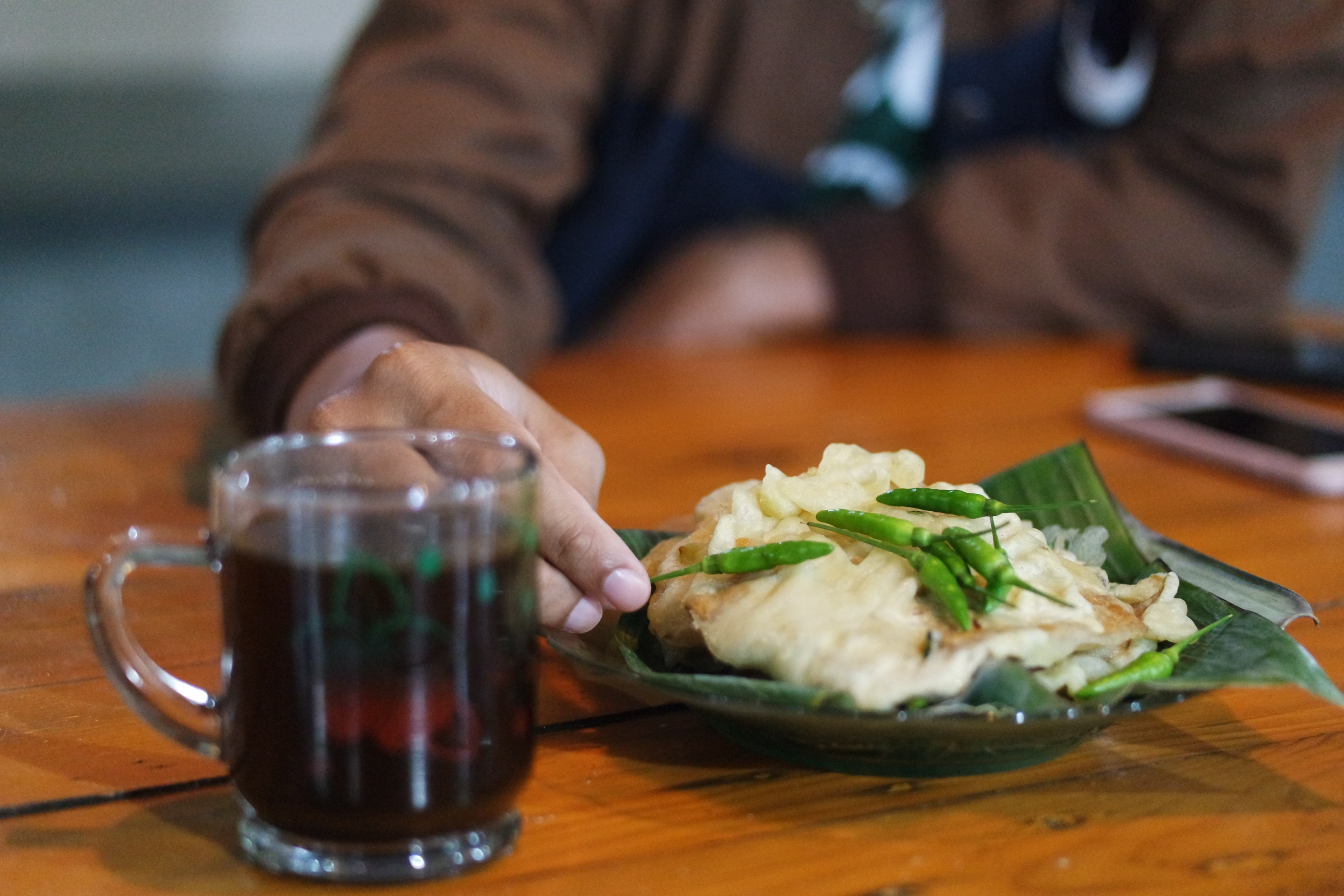 Mendoan dan kopi tubruk adalah perpaduan sempurna untuk dinikmati di musim hujan.